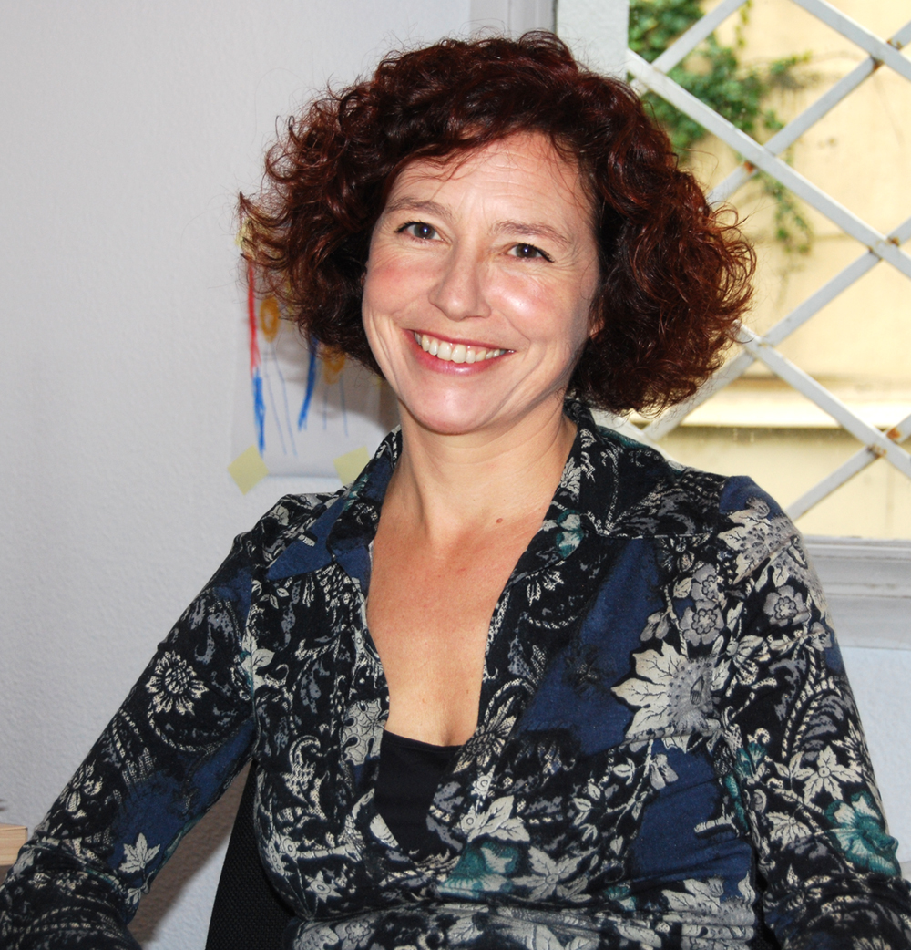 Icíar Bollaín en la presentación de También la lluvia